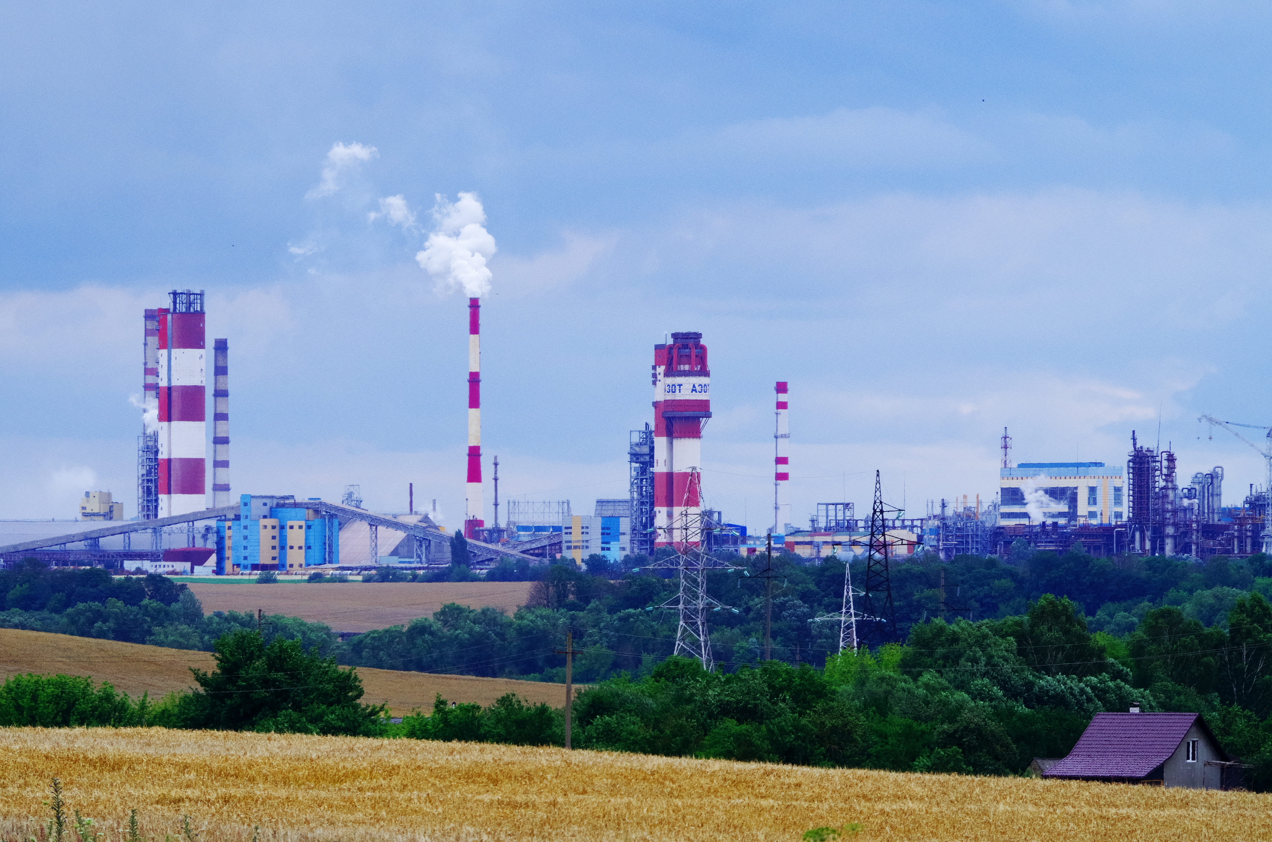 Промышленный пейзаж. Гродно. Беларусь.